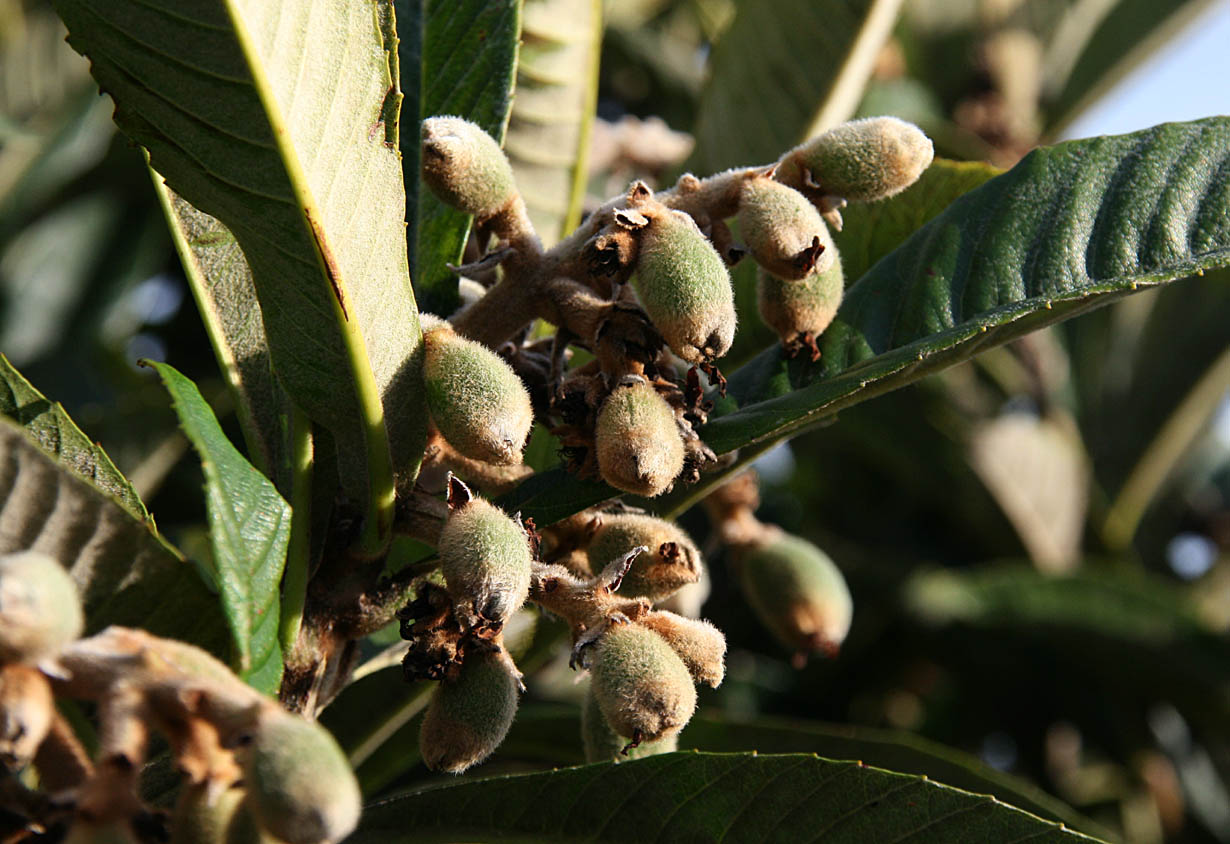 main de fruits année on year avant éclaircissage